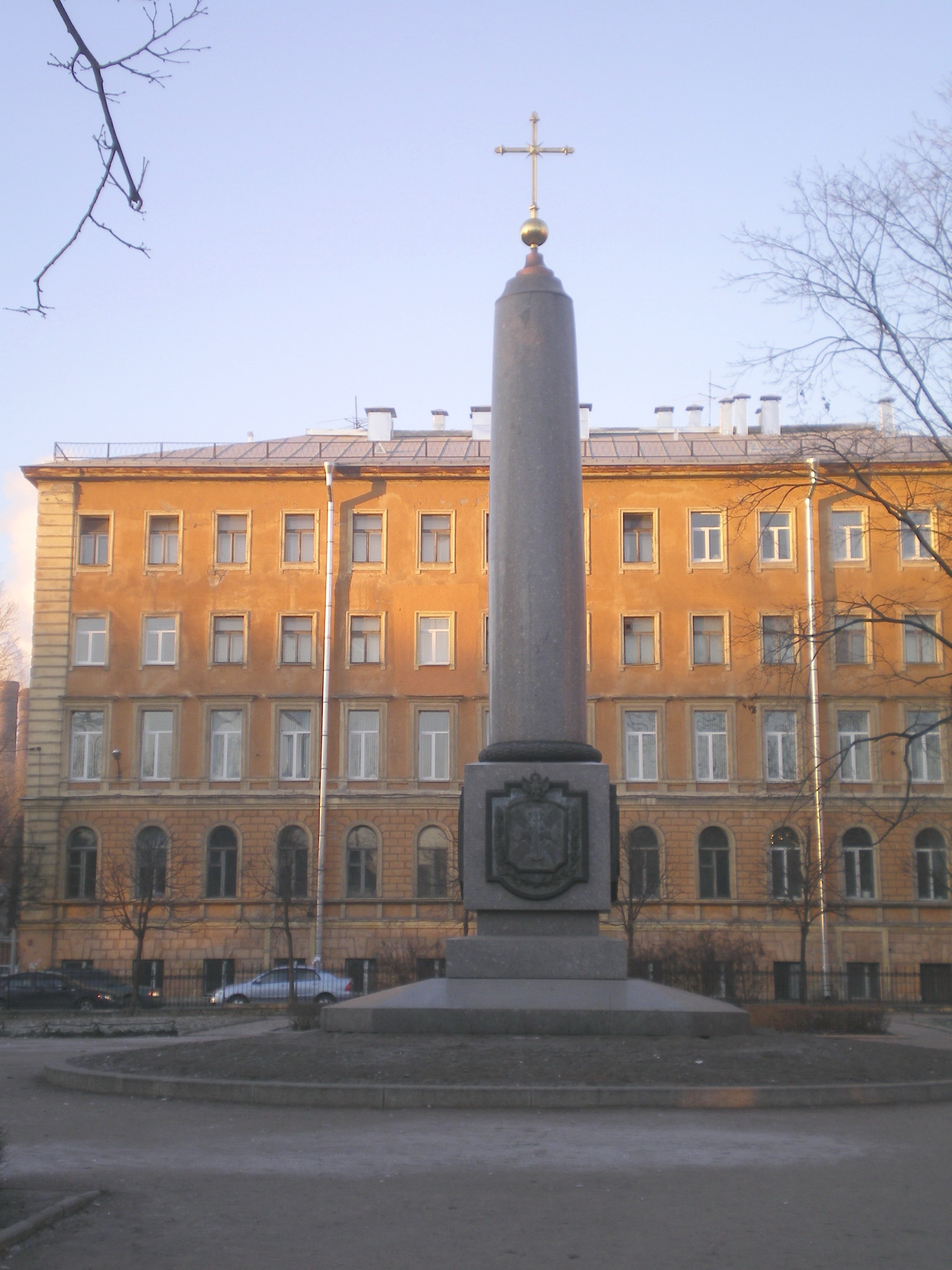 Колонна памяти церкви введения богородицы во храм на Загородном проспекте в Санкт-Петербурге